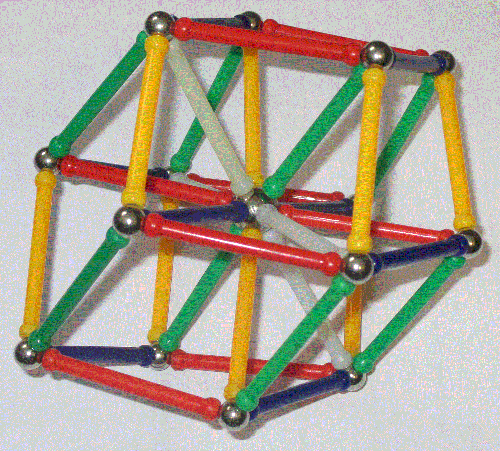 Orthogonale Projektion mit deckungsgleichen Innenecken und farblich differenzierten Dimensionskanten. Die weißen Streben dienen nur der Stabilisierung der Konstruktion.